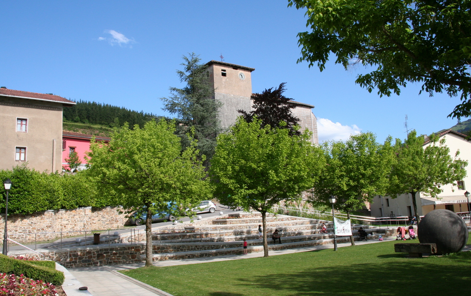 Etxebarriako elizaren ikuspegia